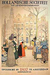 Hollandsche Societeit van Levensverzekeringen